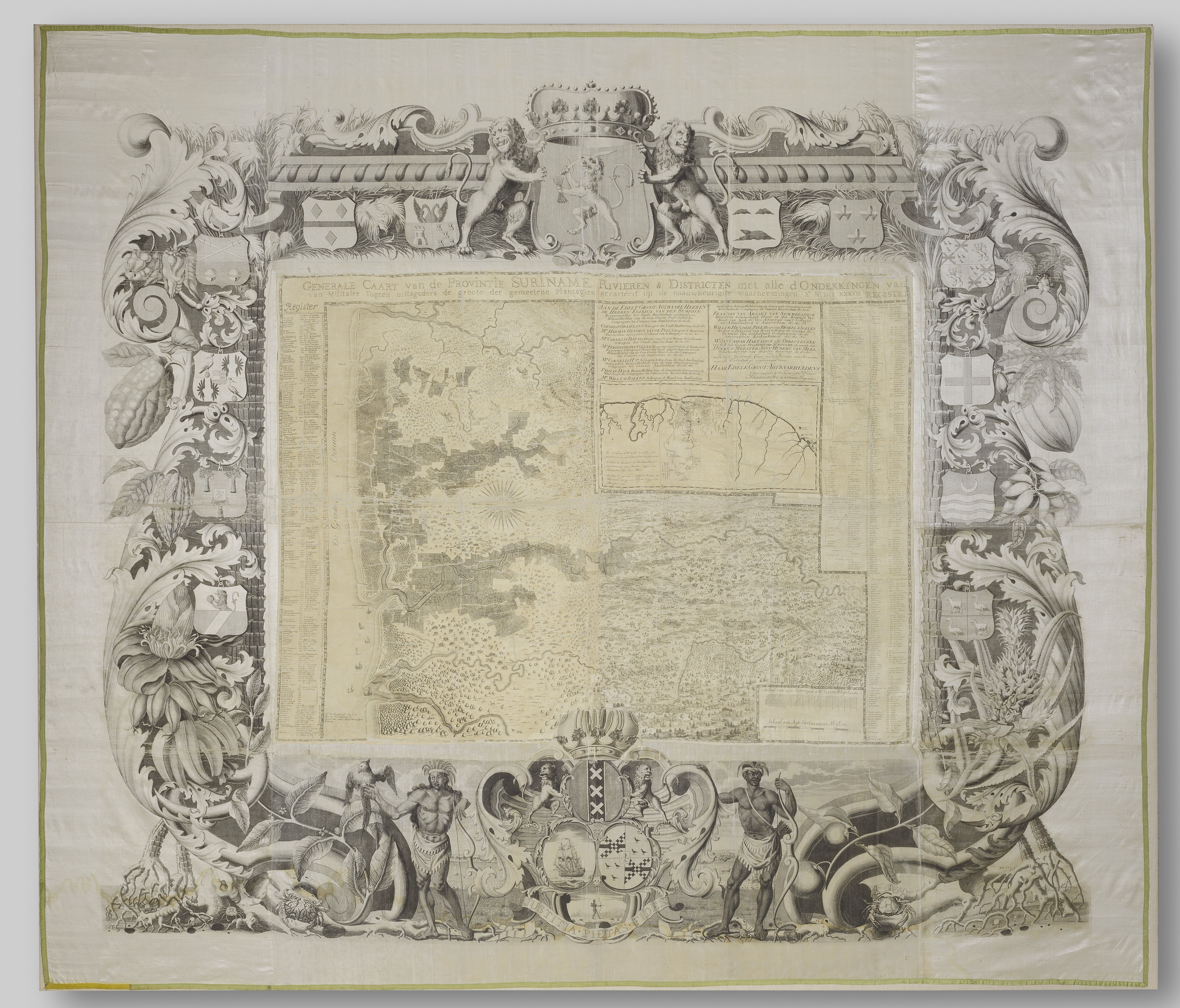 IdentificatieTitel(s): Kaart van SurinameGenerale Caart van de Provintie Suriname Rivieren & Districten met alle d Ontdekkingen van van Militaire Togten mitsgaders de groote der gemeetene Plantagien gecarteerd op de naauwkeurigste Waar: neemingen (titel op object)Objecttype: kaart Objectnummer: NG-539Omschrijving: Kaart van Suriname met rijkversierde rand waarin de wapens van de elf directeuren en de secretaris van de Sociëteit van Suriname, met bladranken, bloemen en vruchten. Het wapen onderaan (samengesteld uit de wapens van Amsterdam, de WIC en de familie Sommelsdijck) met twee Surinaamse mannen als schilddragers. Op de kaart zijn ca. 400 plantages aangegeven.VervaardigingVervaardiger: cartograaf: Alexander de Lavaux (eigenhandig gesigneerd)cartograaf: J.G. de la CroixPlaats vervaardiging: cartograaf: Surinamecartograaf: NederlandDatering: 1737Materiaal: zijde Techniek: drukkenAfmetingen: buitenmaat: h 186,5 cm. × b 215,5 cm. × d 4,5 cm. × h 195 cm. (incl. transportlijst) × b 225 cm. (incl. transportlijst) × d 10 cm. (incl. transportlijst)ToelichtingDe kaart werd gemaakt in opdracht van de Sociëteit van Suriname, het bestuur van de kolonie. Er zijn ongeveer 400 plantages op aangegeven.OnderwerpWat: maps of separate countries or regionscoat of arms (as symbol of the state, etc.)African Americansslavery; serfs and the enslavedornament derived from plant formsWanneer: 1737 - 1737WaarSurinameWie: Geoctroyeerde Sociëteit van SurinameVerwerving en rechtenVerwerving: aankoop 1966Copyright: Publiek domein